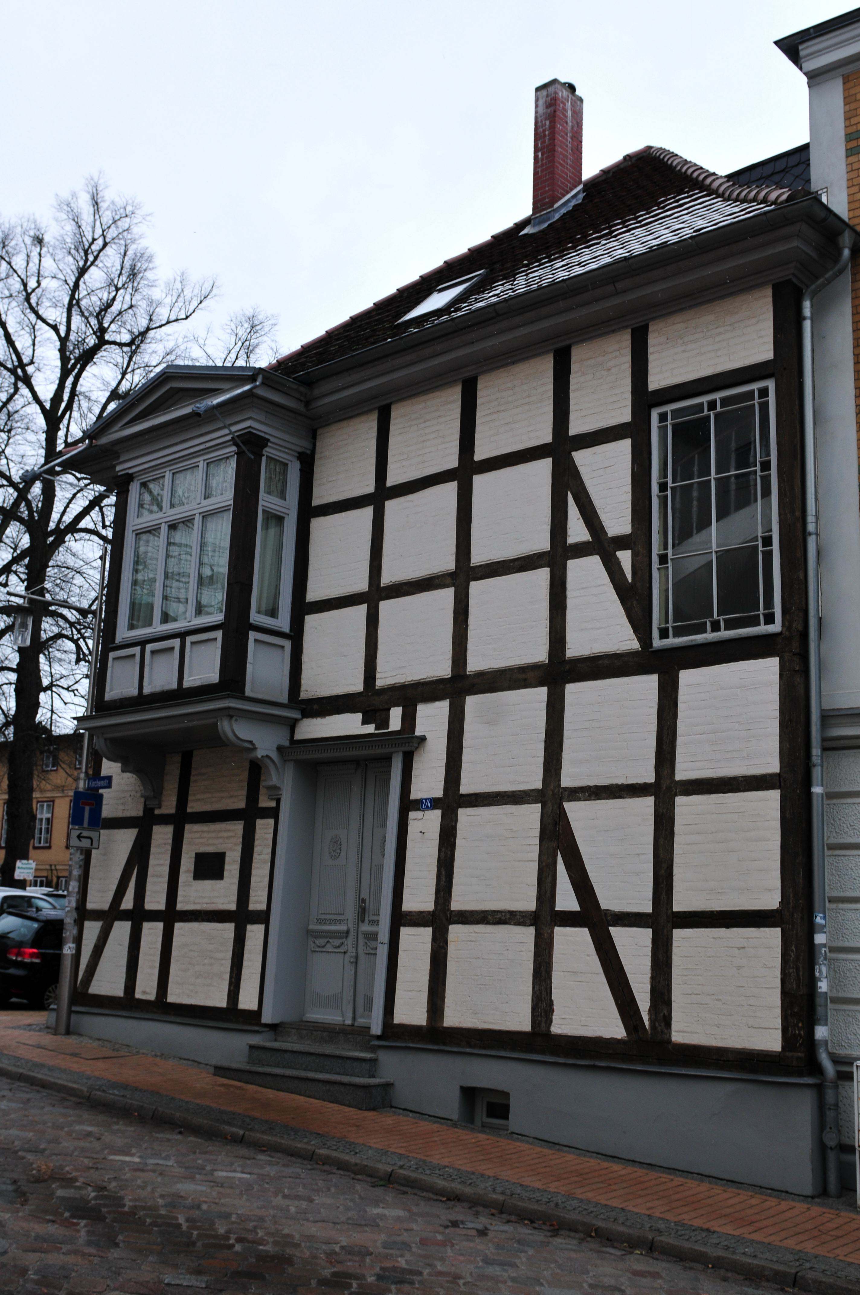 Das denkmalgeschützte Wohnhaus Kirchenstraße 2 im Stadtteil Schelfstadt in Schwerin, Mecklenburg-Vorpommern.